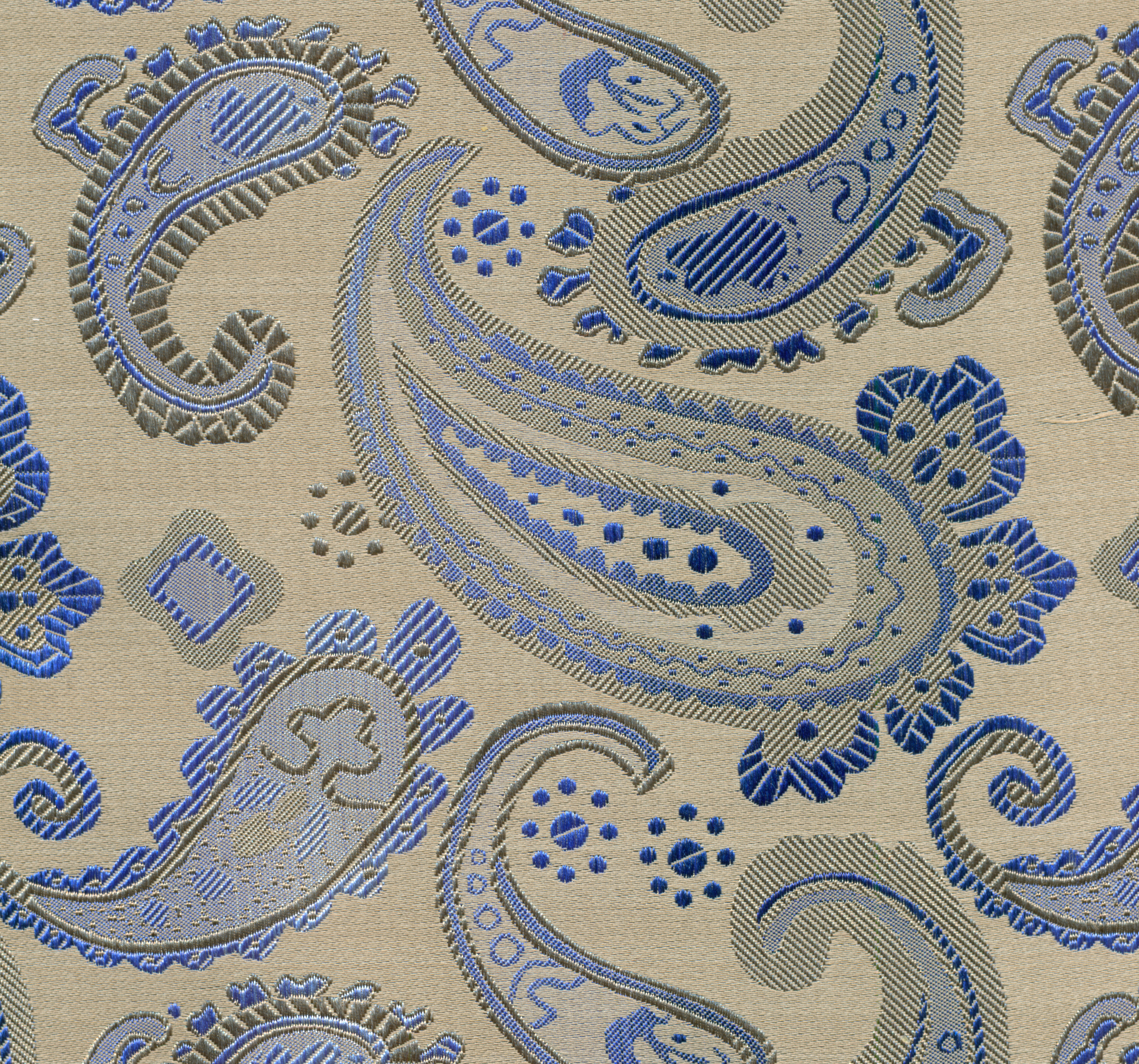 Detail eines Einstecktuchs, Paisleymuster, Seide